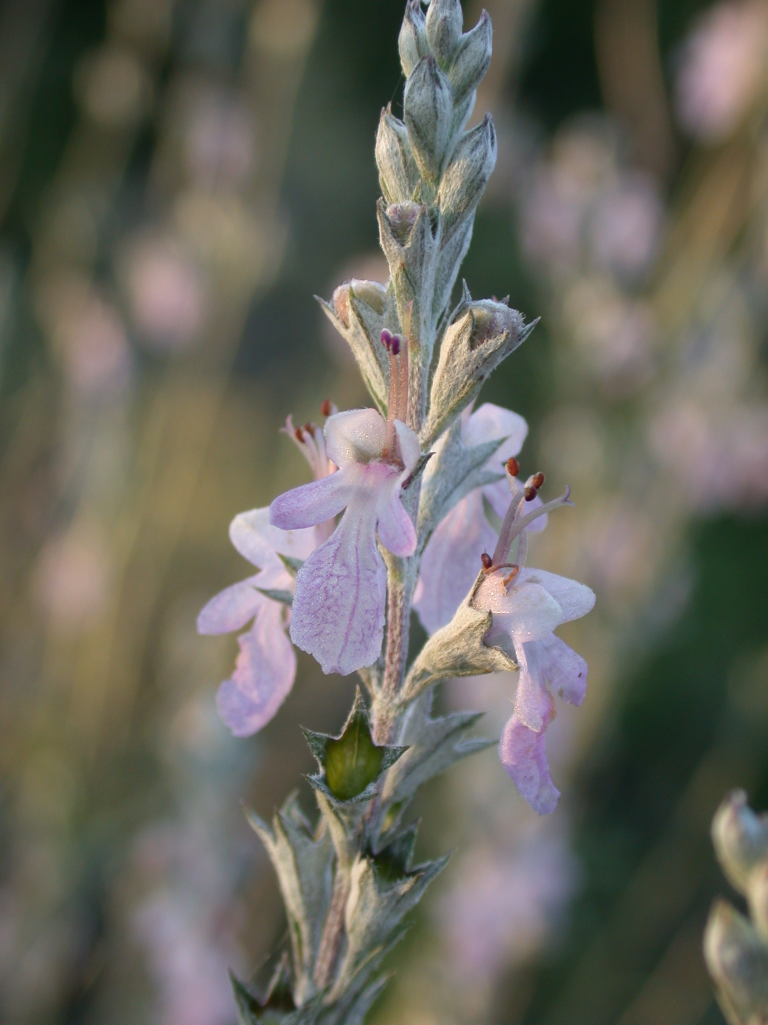 Teucrium creticum L. (געדה כרתית), Mount Carmel, Israel, May 24, 2006.